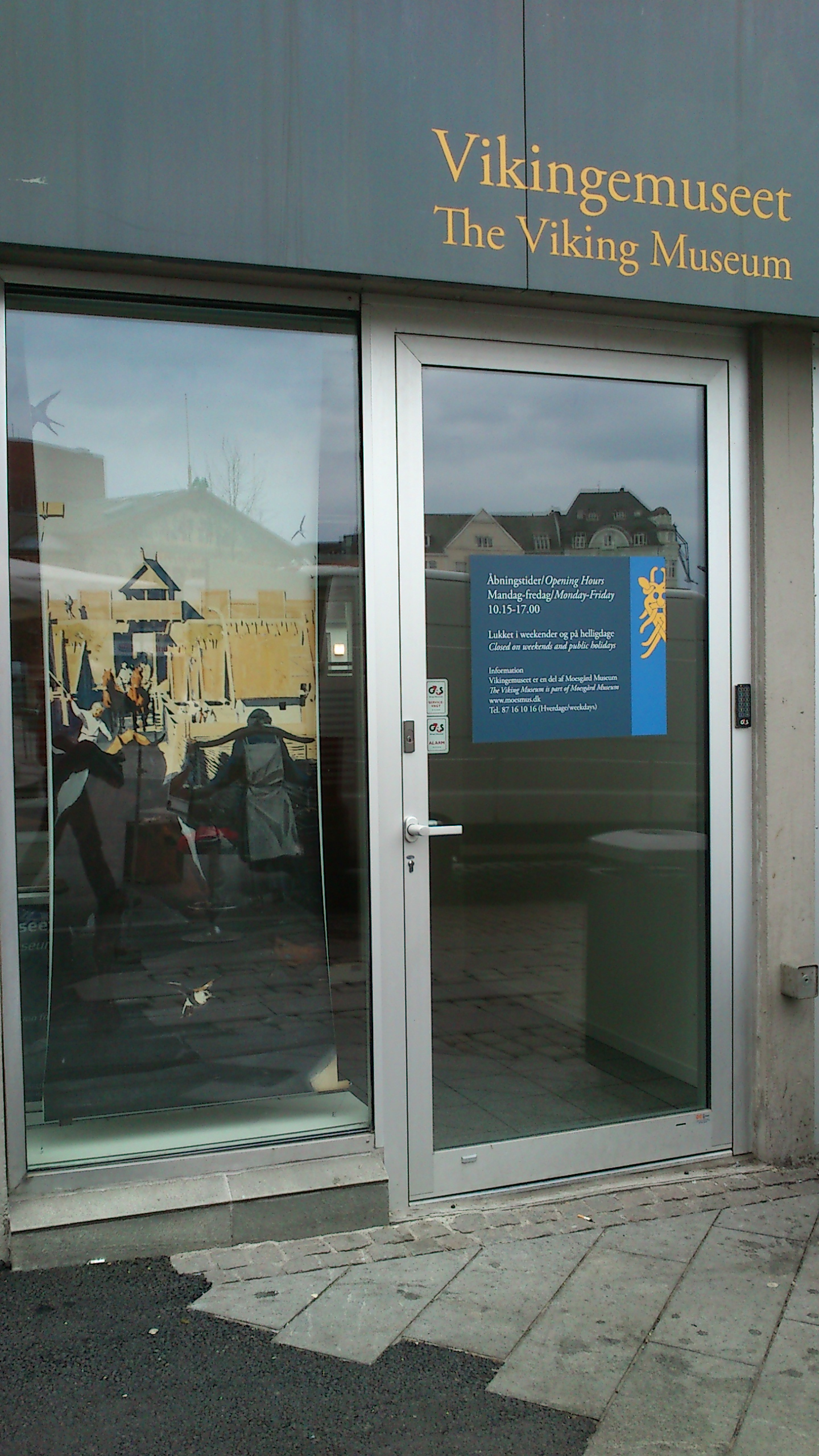 Vikingemuseet i Århus.